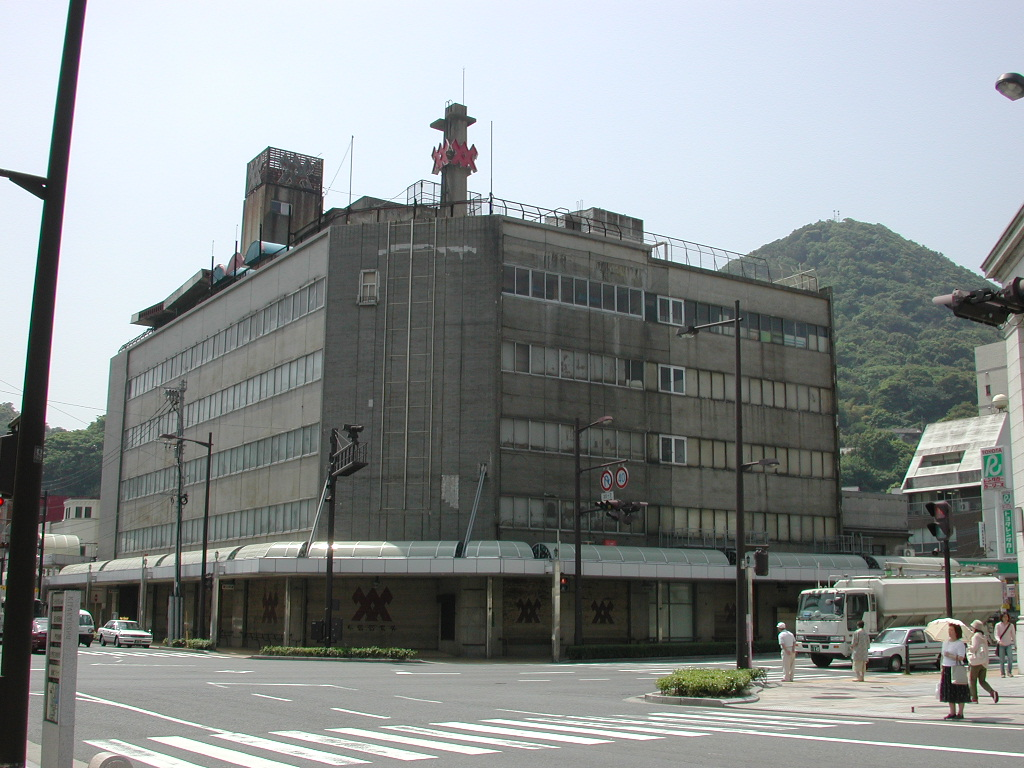 桟橋通交差点から撮影